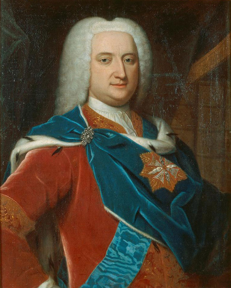 Беларуская (тарашкевіца): Партрэт Казімера Чартарыйскага (Kazimier Čartaryjski)